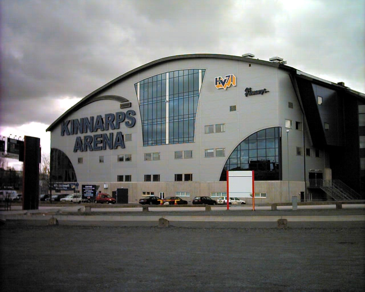 Kinnarps Arena. Photo taken by User:Boivie in Jönköping 7 April 2006